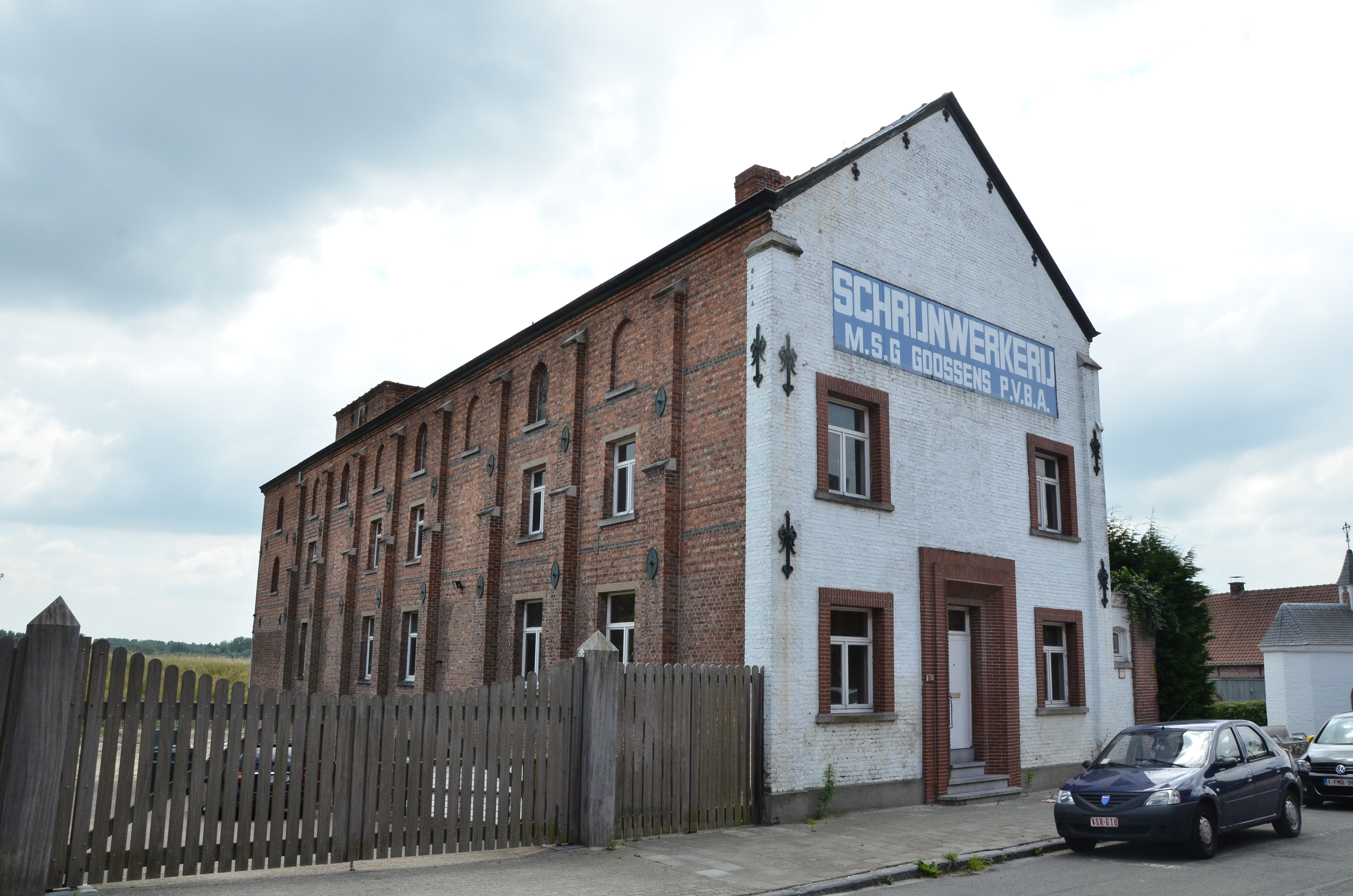 Gebouwen, mouterij De Brabander